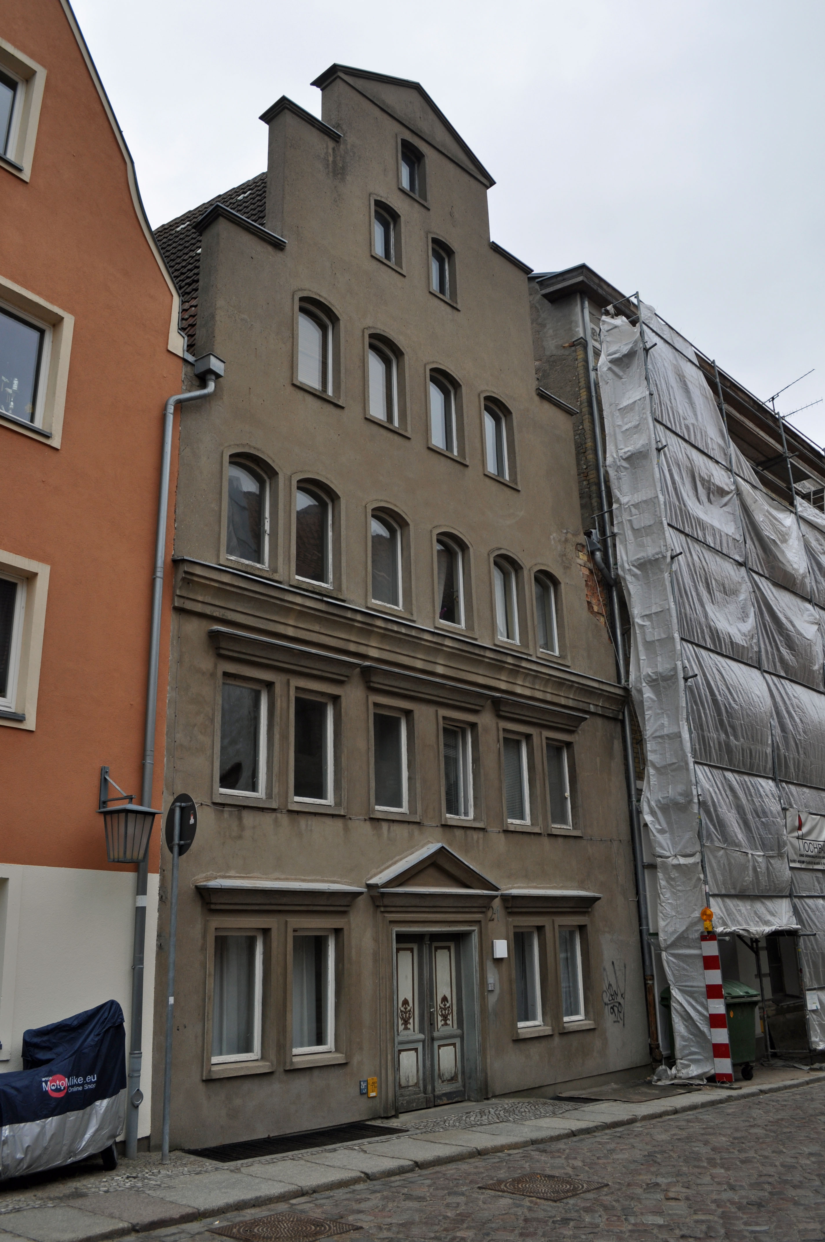 Gebäude bzw. Gebäudedetail in Stralsund. Straße und Hausnummer siehe Dateiname.